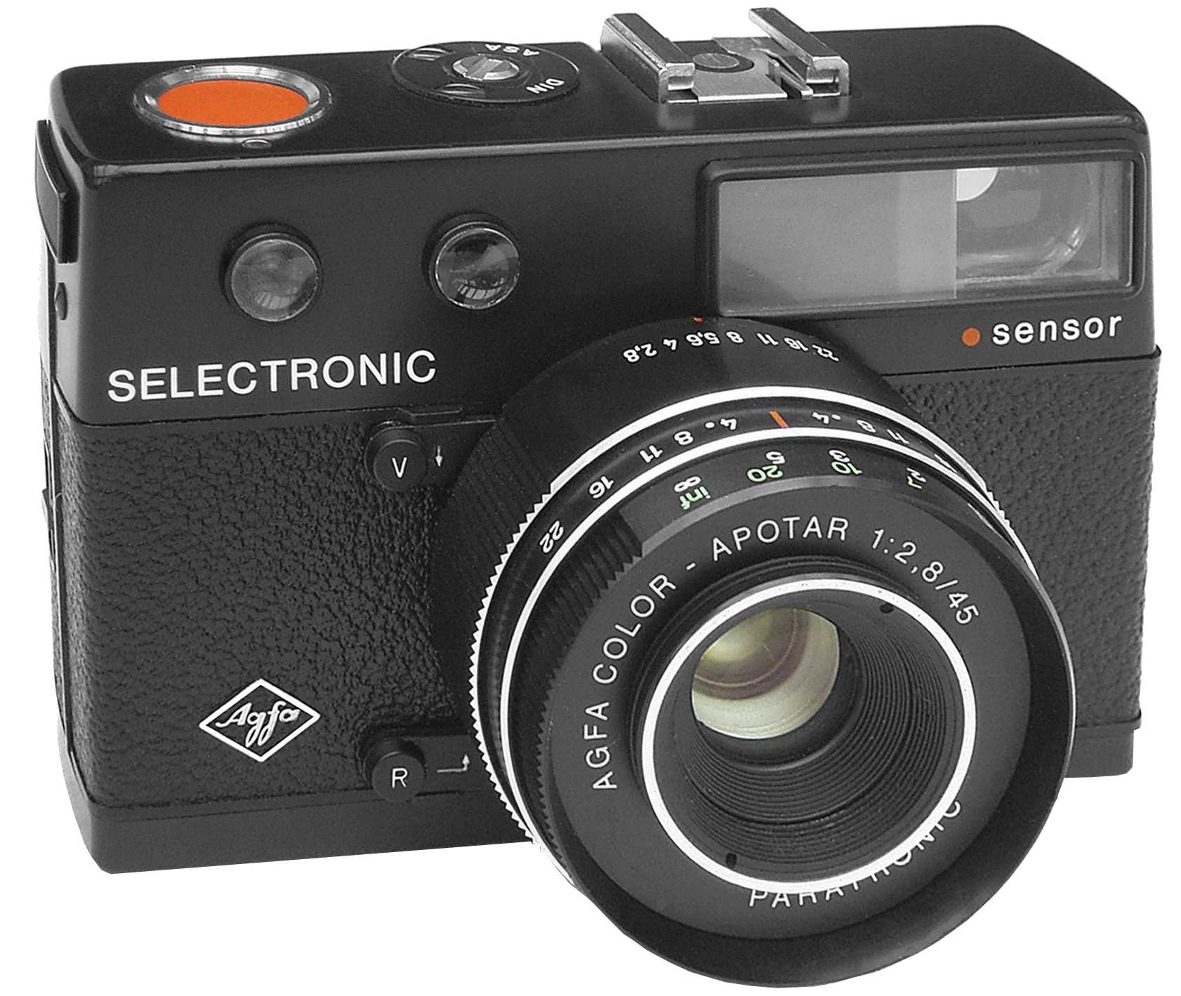 Hatte ich folgendes nicht schon an anderer Stelle geschrieben? 1. Beim Filmtransport verschwindet der belichtete Film hinter einer Klappe, so ist er bei versehentlichem Öffnen geschützt. 2. Man spult den Film mit dem Schnellschalthebel zurück, nachdem man vorher einen Umschaltknopf betätigt hat! 3. Die Auslösung über den roten Sensor-Punkt ist wirklich sehr sanft und erschütterungsfrei. Richtig! Diese drei exklusiven Merkmale der Selectronic Sensor findet man später wieder in den genial designten Optima-sensor-electronic-Modellen. Der äußerliche Unterschied fällt natürlich sofort ins Auge. Die Selectronic sensor hatte die recht konventionelle, für die damalige Zeit aber moderne sachliche Form der Optima 500 fortgesetzt. Ein großer Erfolg war die die Selectronic nicht, aber das Innenleben hatte sich so bewährt, dass es mit kleinen Abwandlungen für die Optima Sensor electronic übernommen wurde. Während aber die neuen Optimas einen voll programmierten Paratronic-Verschluss besaßen (man hatte keinen Einfluss auf Belichtungszeit und Blende), war die Selectronic sensor ein Zeitautomat: Die Blende wird vorgewählt, die Zeit dazu wird von der Kamera errechnet und eingestellt. Beide Werte sieht man im Sucher. Dieses System gefällt mir viel besser. Es gab noch die Selectronic "S", die mit dem Vierlinser Solinar statt mit dem Dreilinser Apotar ausgerüstet war und außerdem einen Messsucher besaß. Die Selectronic kostete 1971 349,- DM, die Selectronic S 449,- DM.